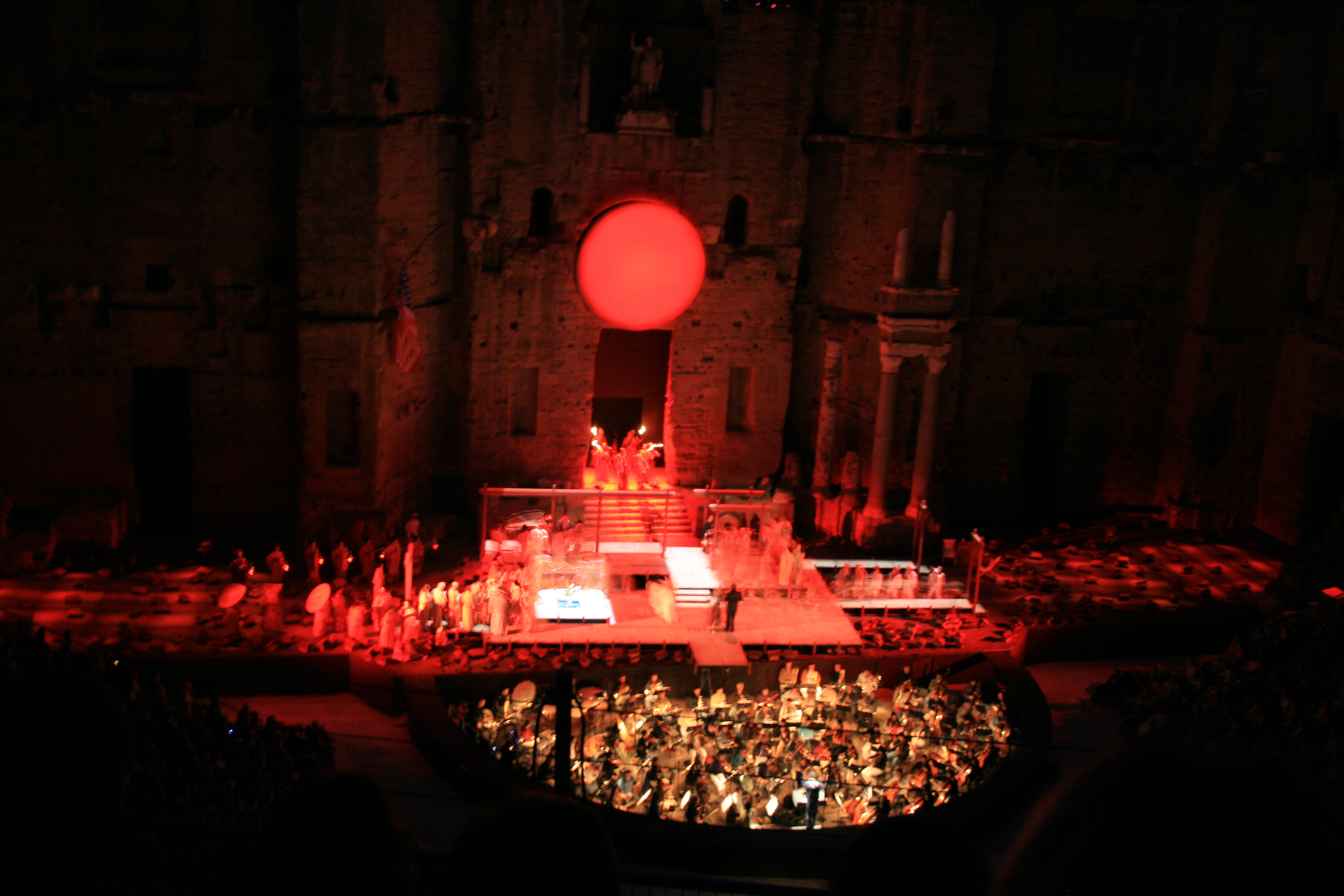 Opéra du Puccini : Madame Butterfly